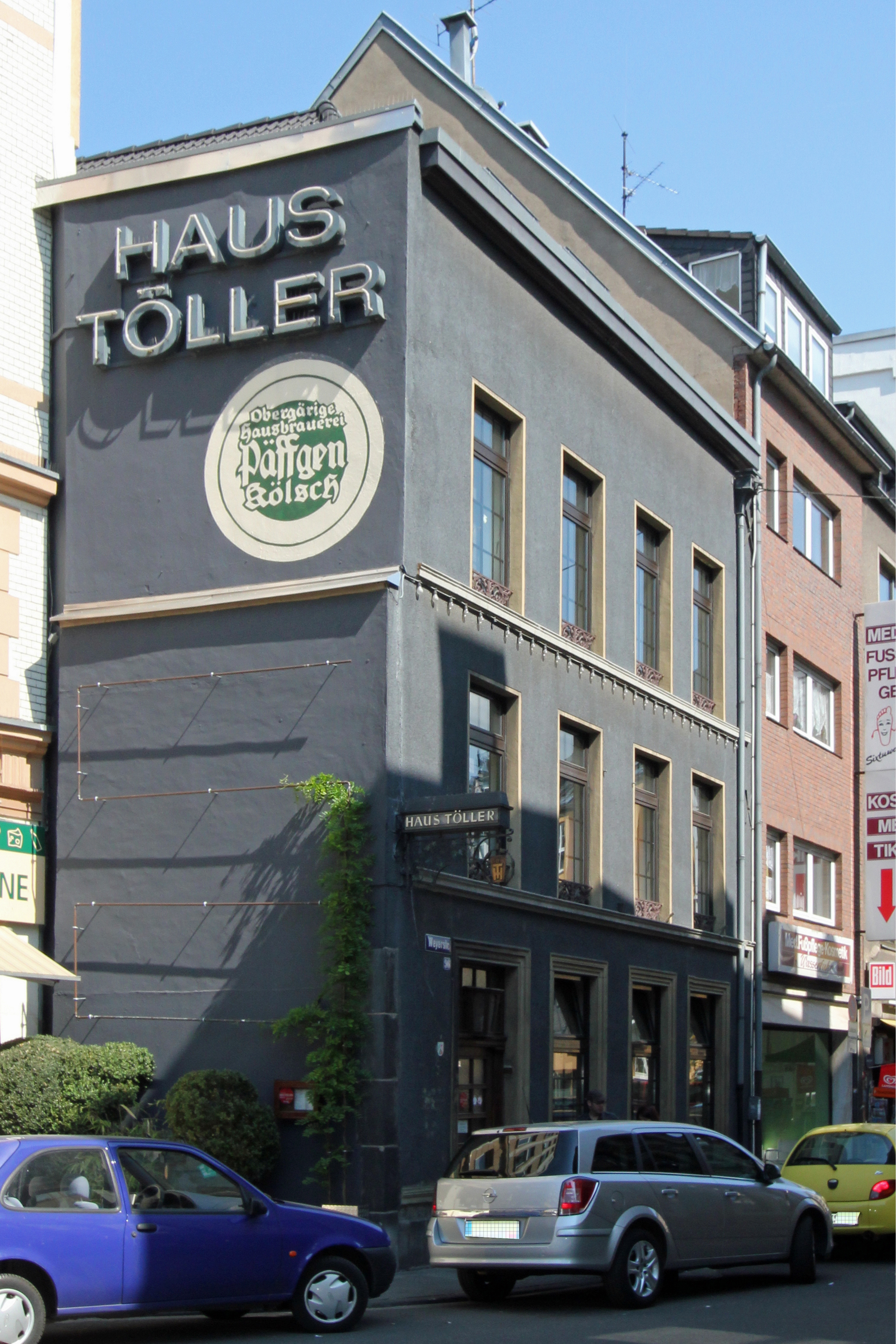 Köln Weyerstraße 96, Haus Töller